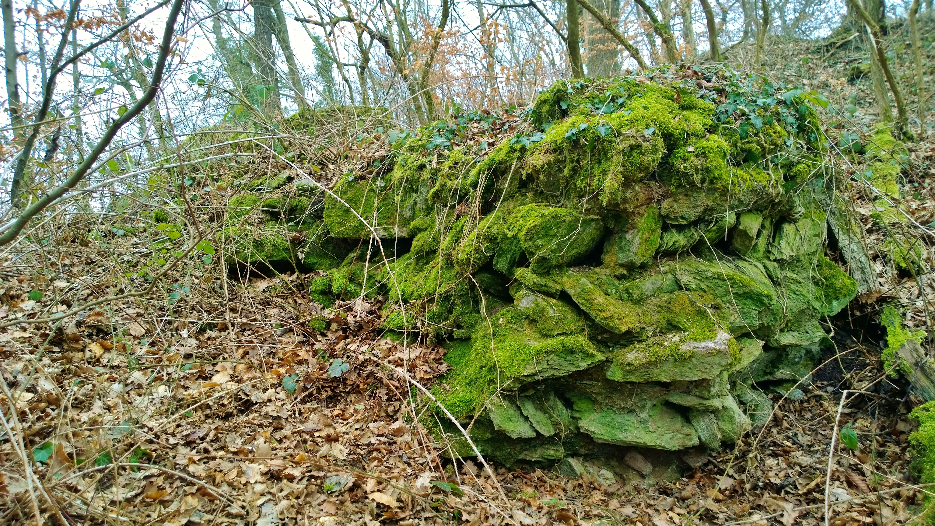 Burgmauerrest am Burgstall Kugelberg (Nordwesten)